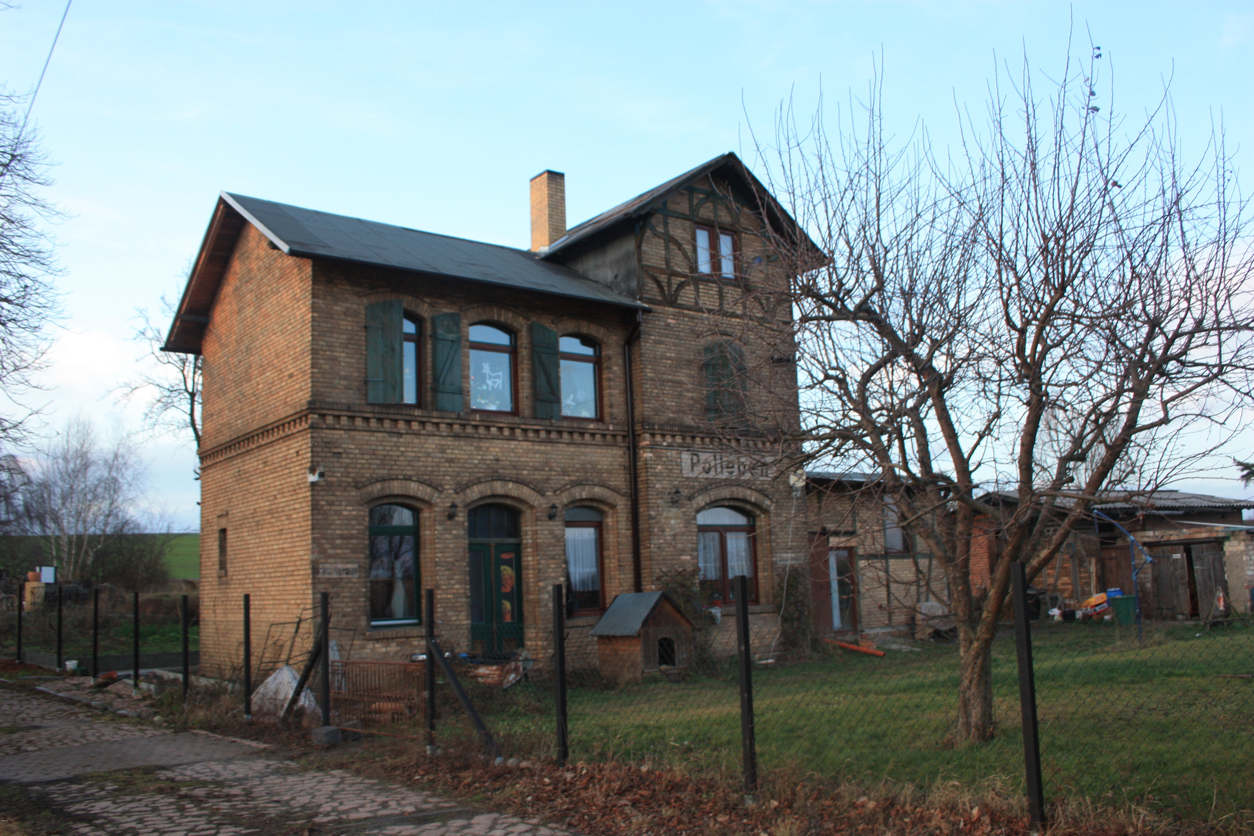 der alte Bahnhof von Polleben